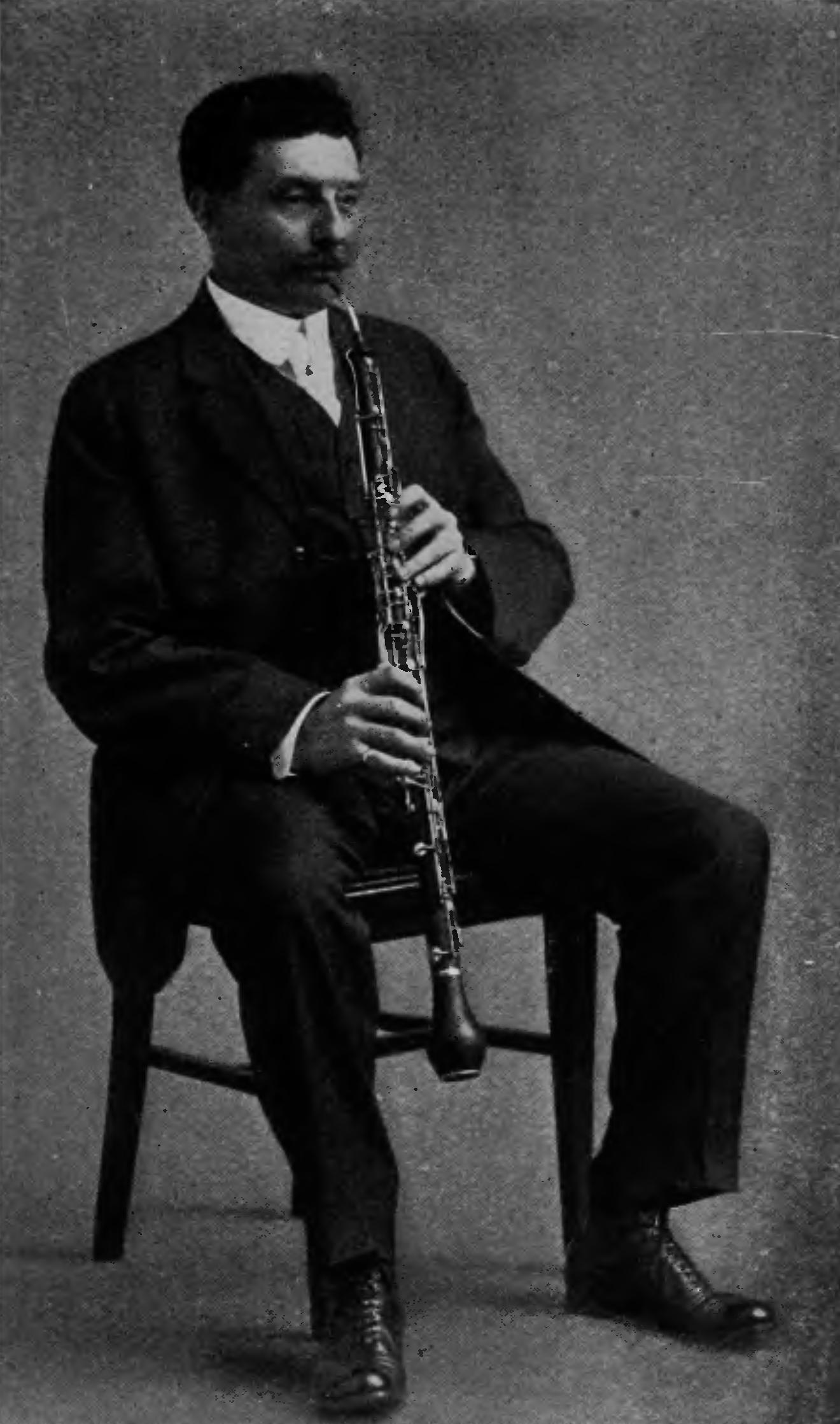 Romeo BoninsegnaMetropolitan Opera House Orchestra, N. Y.